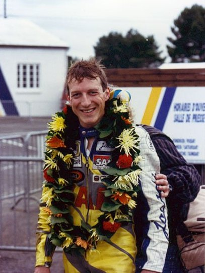 Rachel Nicotte au Mans en 1988 après sa victoire en championnat de France 500cc